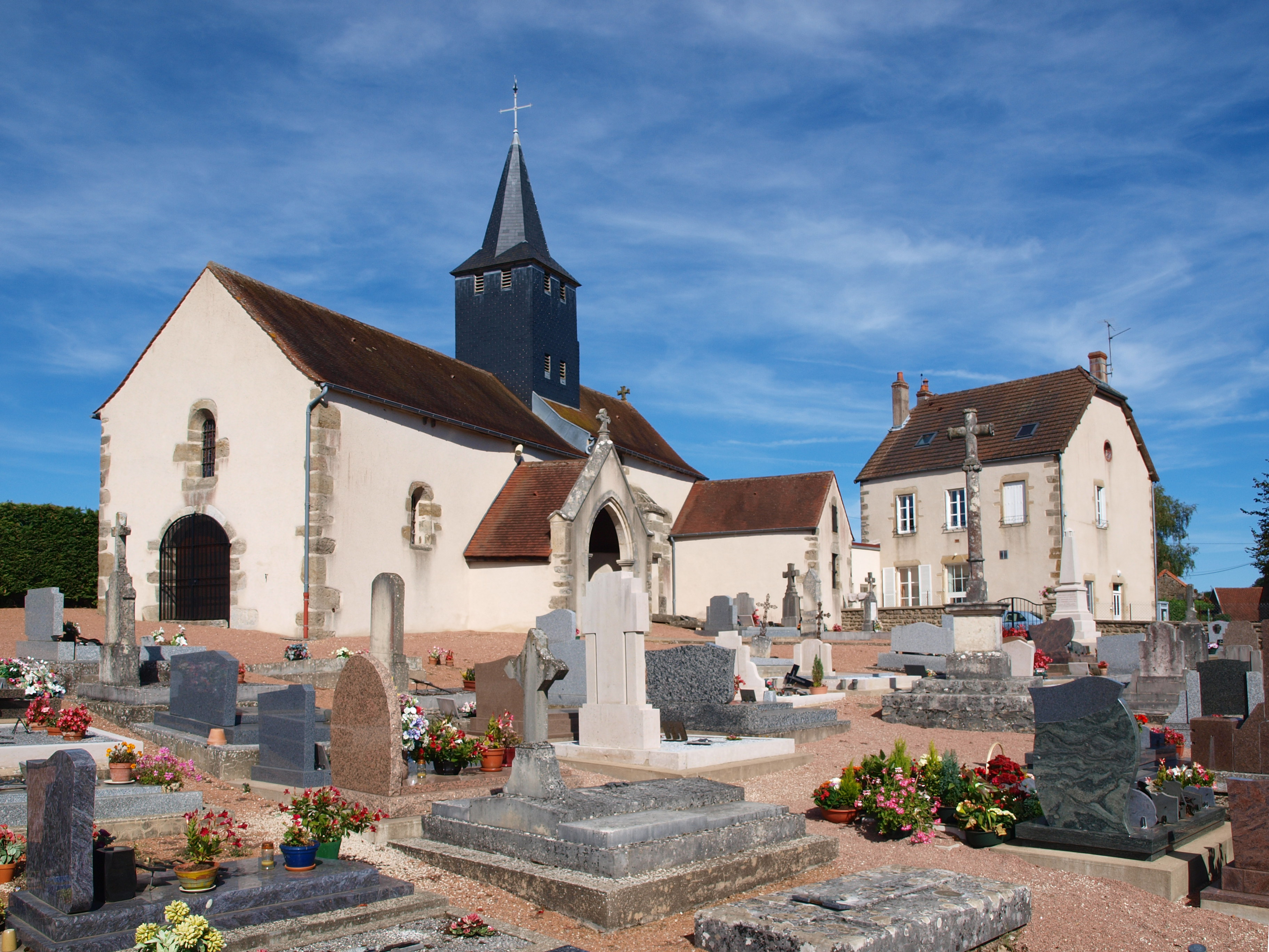 Musigny (Côte-d'Or, France) ; la mairie, le cimetière, le monument aux morts & l'église.